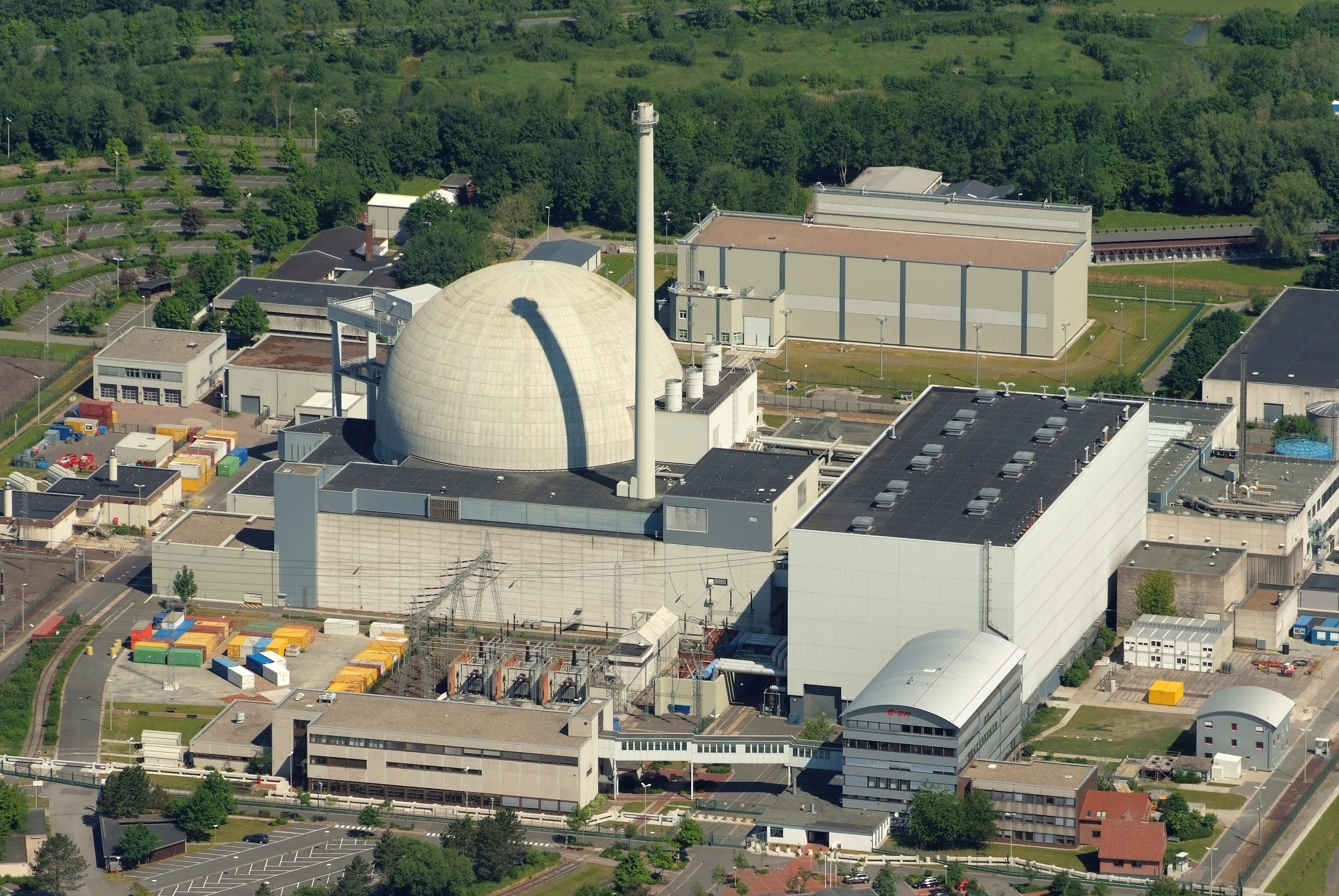 Kernkraftwerk Unterweser, Fotoflug vom Flugplatz Nordholz-Spieka über Cuxhaven und Wilhelmshaven